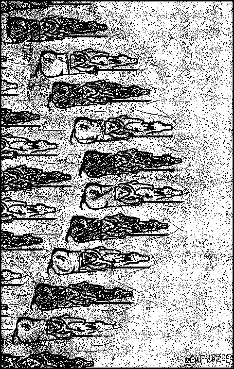 Karolinsk Kavalleri formation